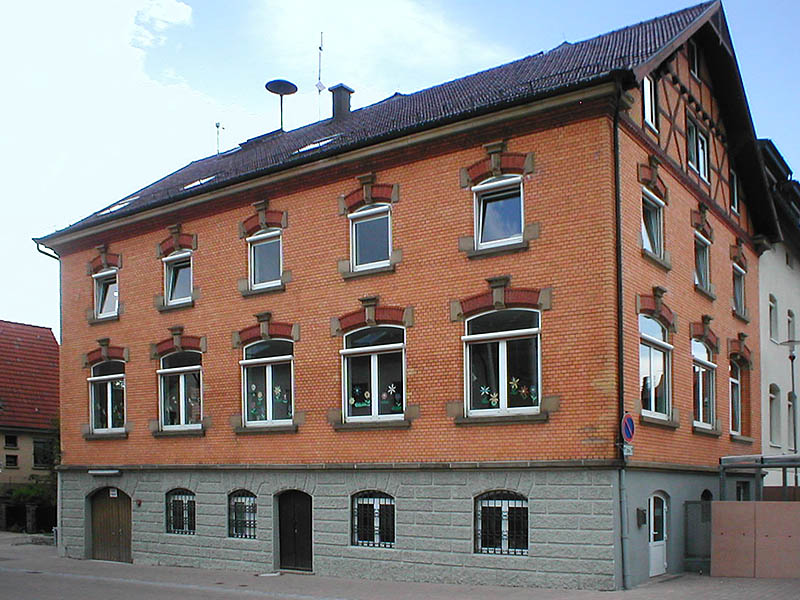 Historisches Schulhaus in Massenbachhausen, heute: Lindenhofschule